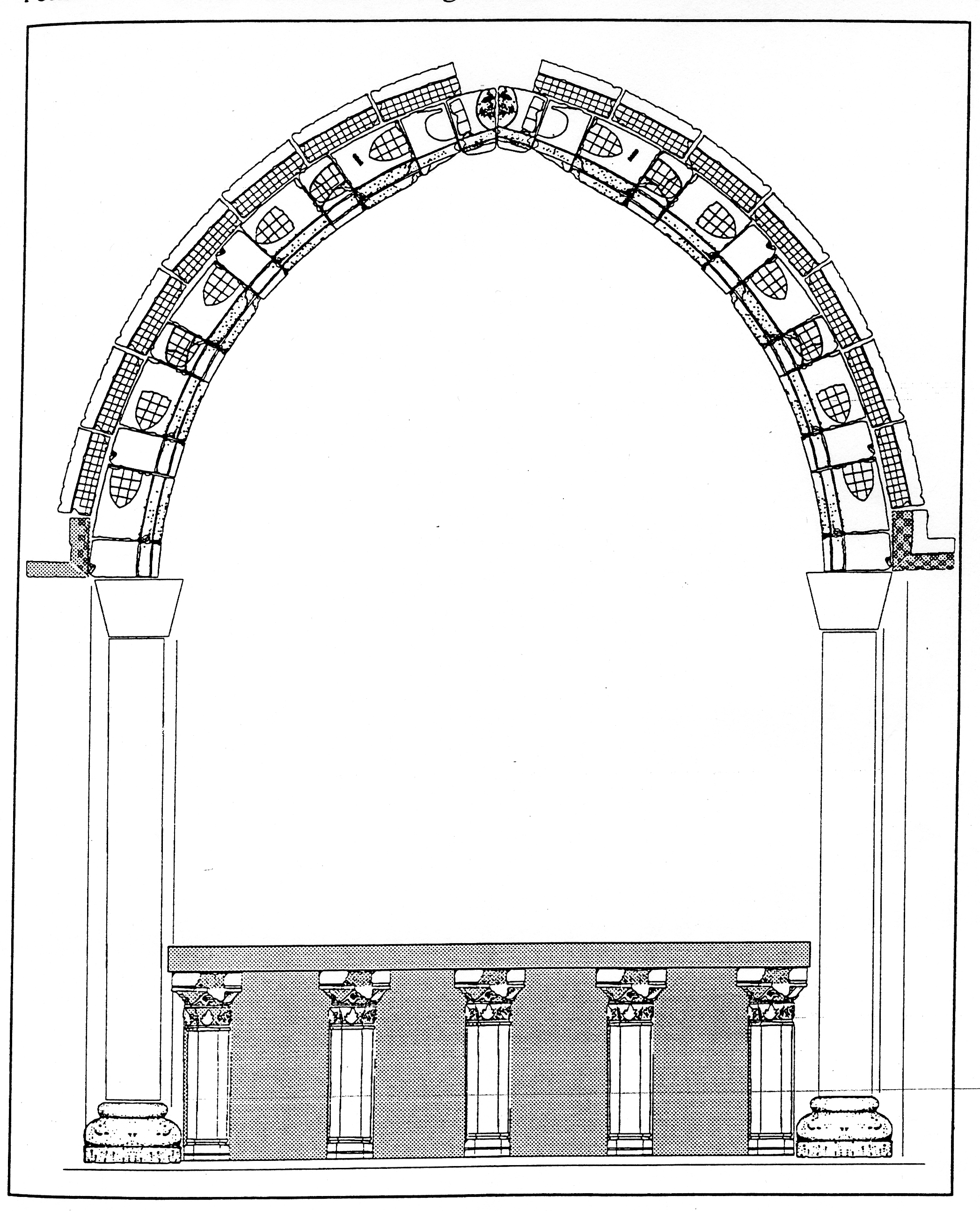 Bajoles (Perpinyà). Restitució teòrica de l'arcosoli i sepulcre probable del comanador Bernat de Fonollet. (segons R. Marichal, 1997 -memòria inèdita-)